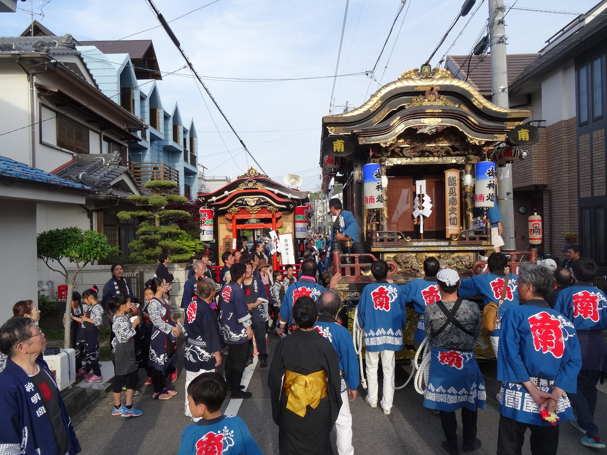 能見神明宮大祭。岡崎市元能見町にて撮影。